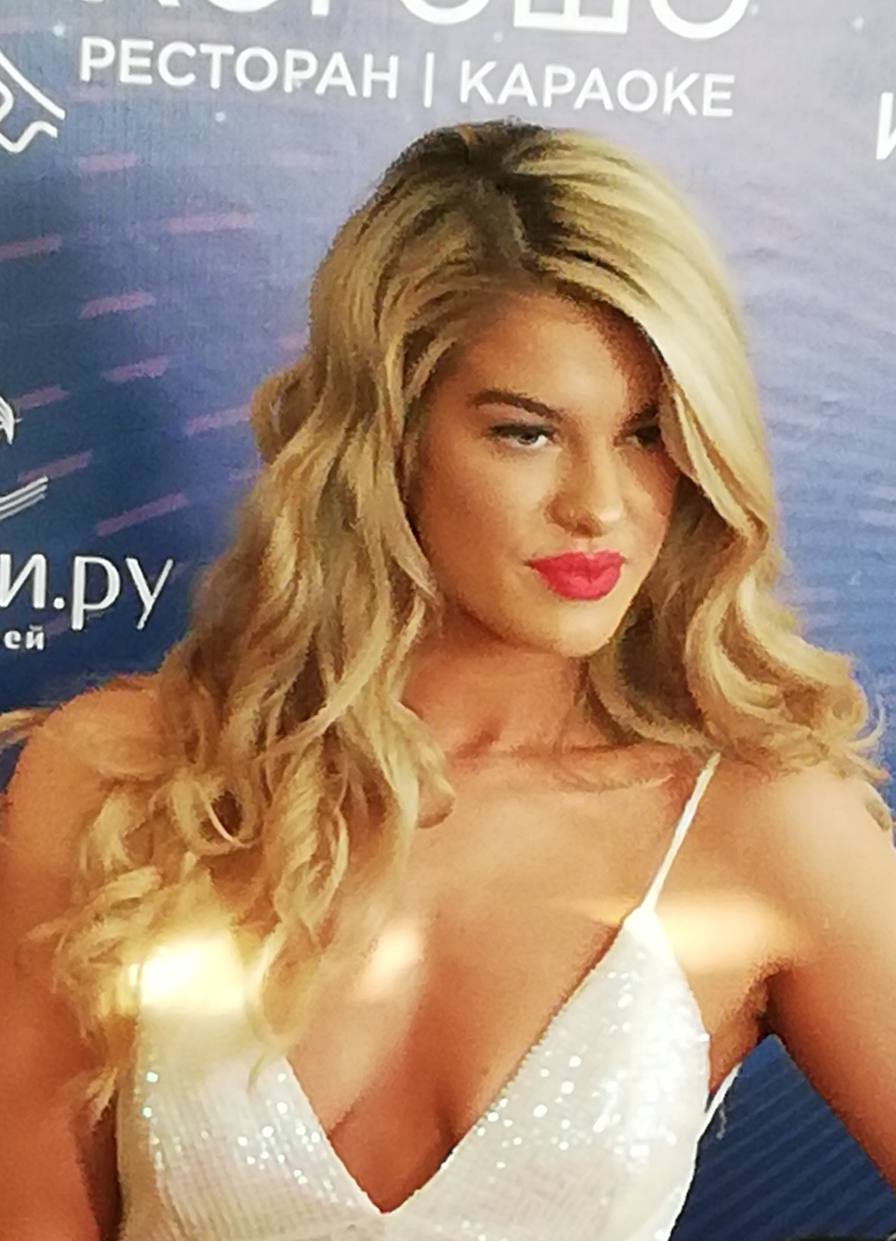 Sarah McTernan, rappresentante dell'Irlanda all'Eurofestival 2019, al Pre-Party di Mosca